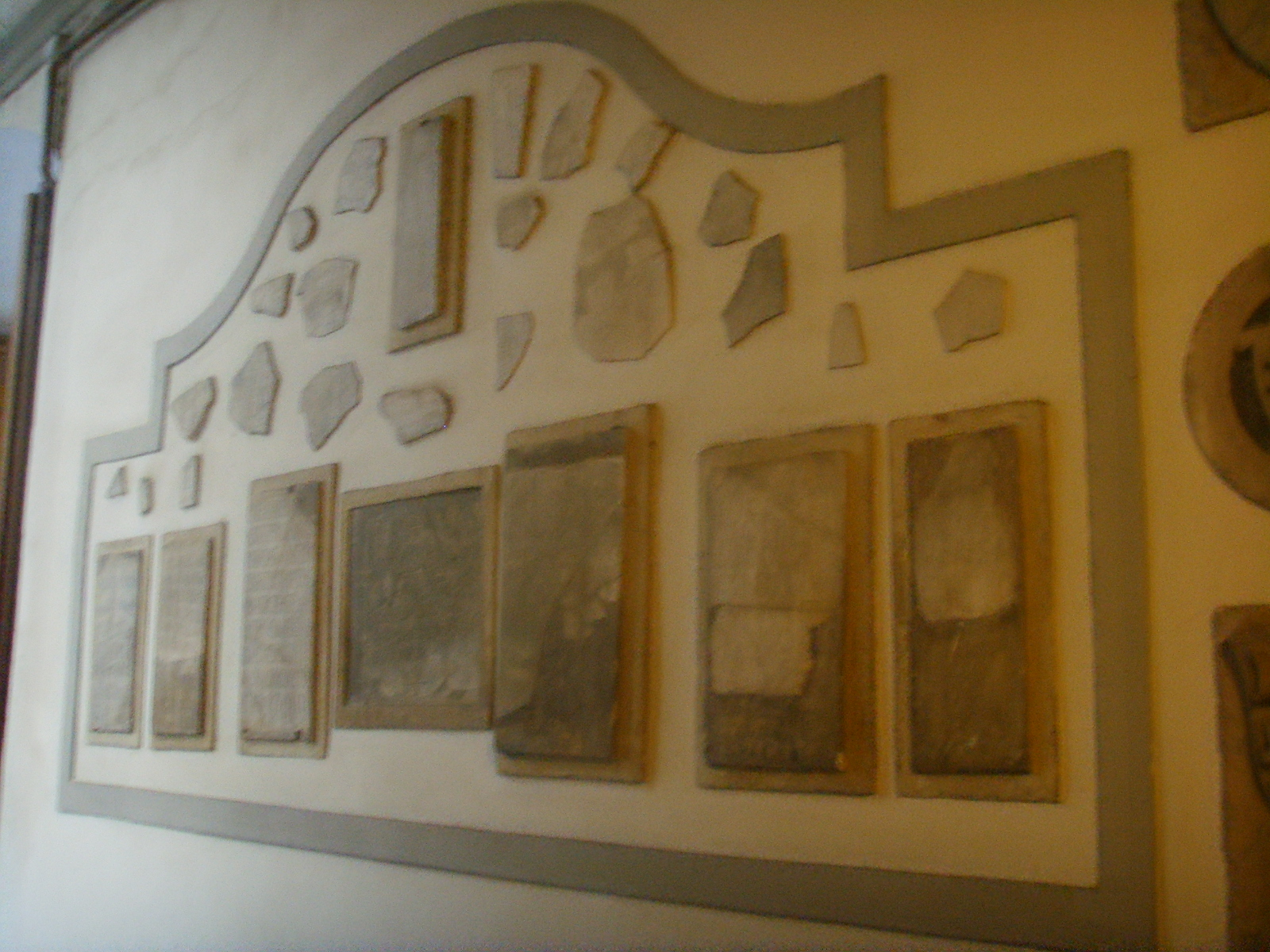 Santa_Felicita, materiale_romano_e_paleocristiano church in Florence